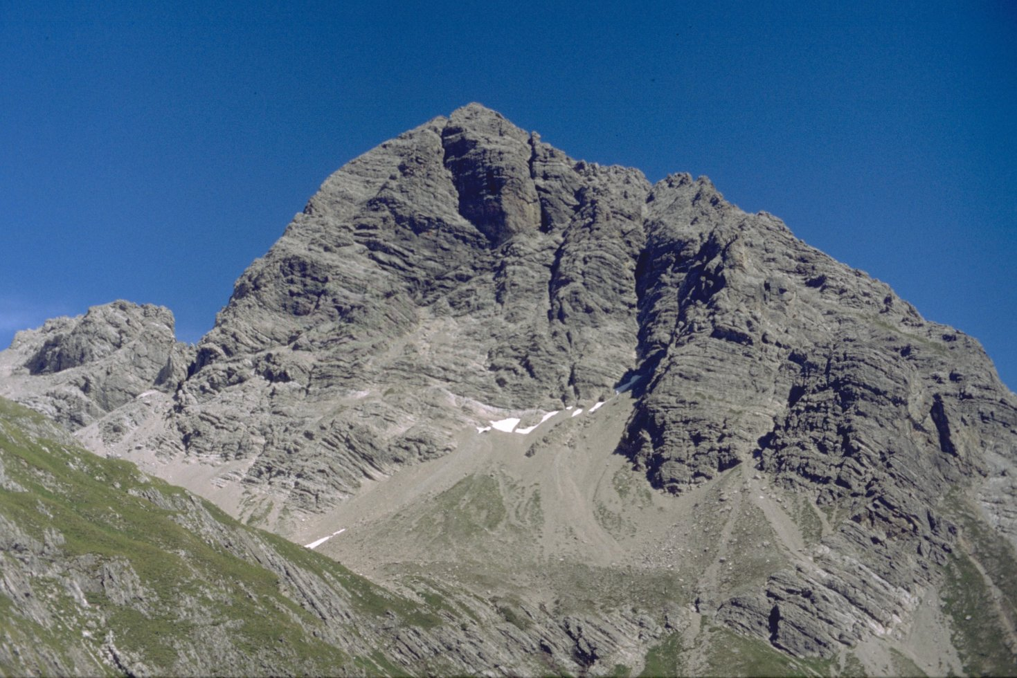 Grosser Krottenkopf von Westen